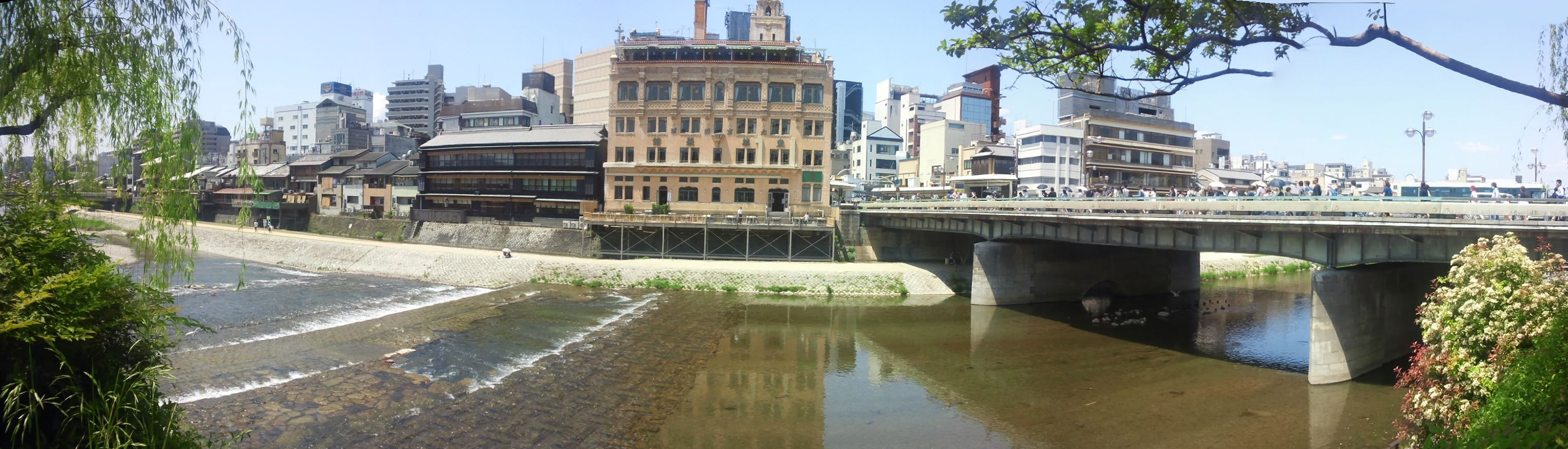 鴨川 パノラマ（四条大橋付近）